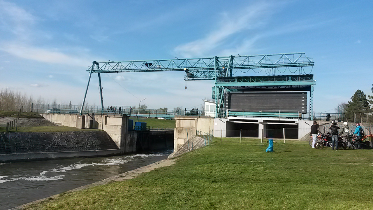 A Ráckevei-Duna zsilipje Tass településnél.